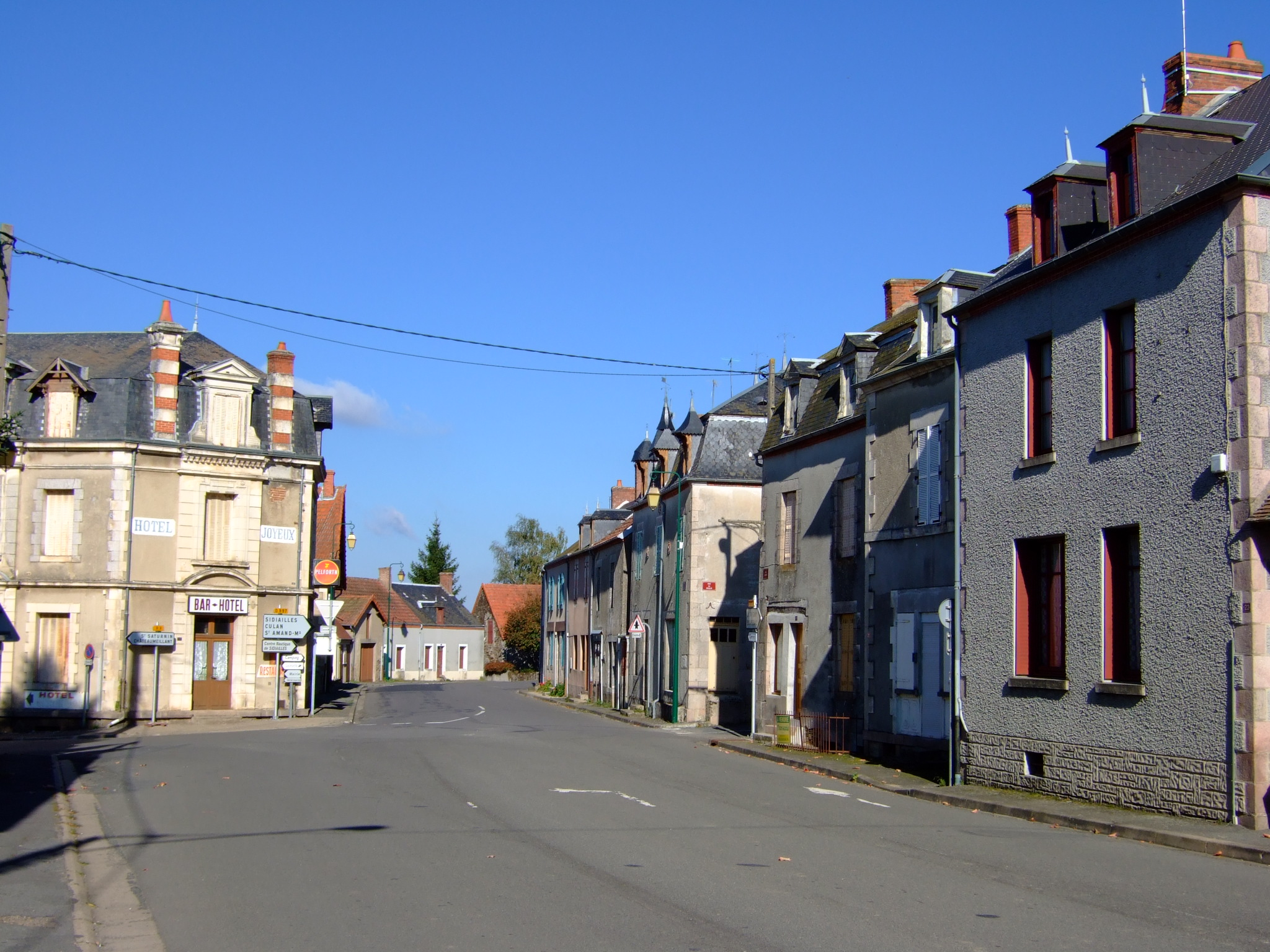 Le village de Préveranges - Photo amateur prise par moi-même